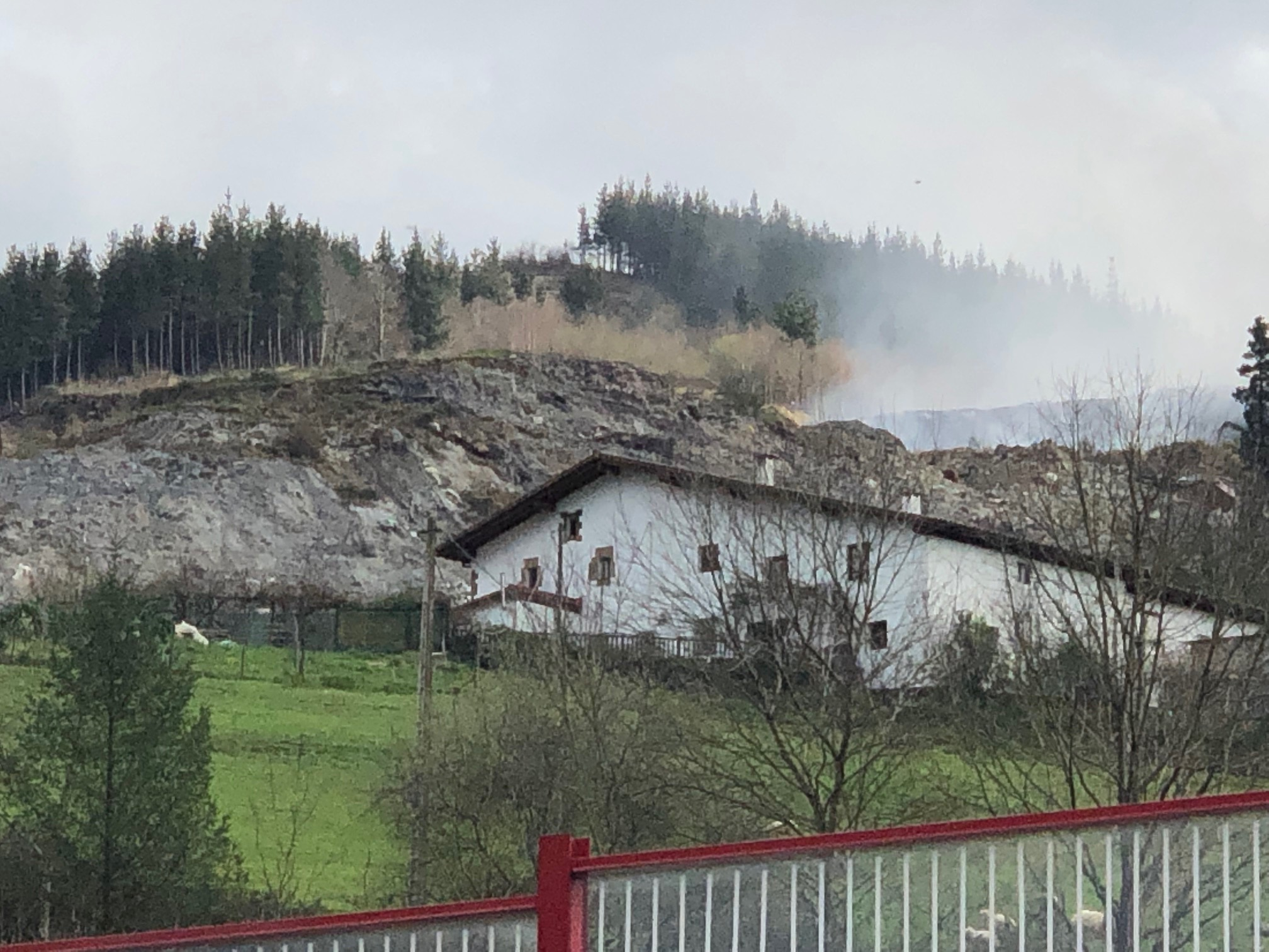 Zaldibarko zabortegia, Eitzagatik ikusita, 2020ko otsailaren 13an.